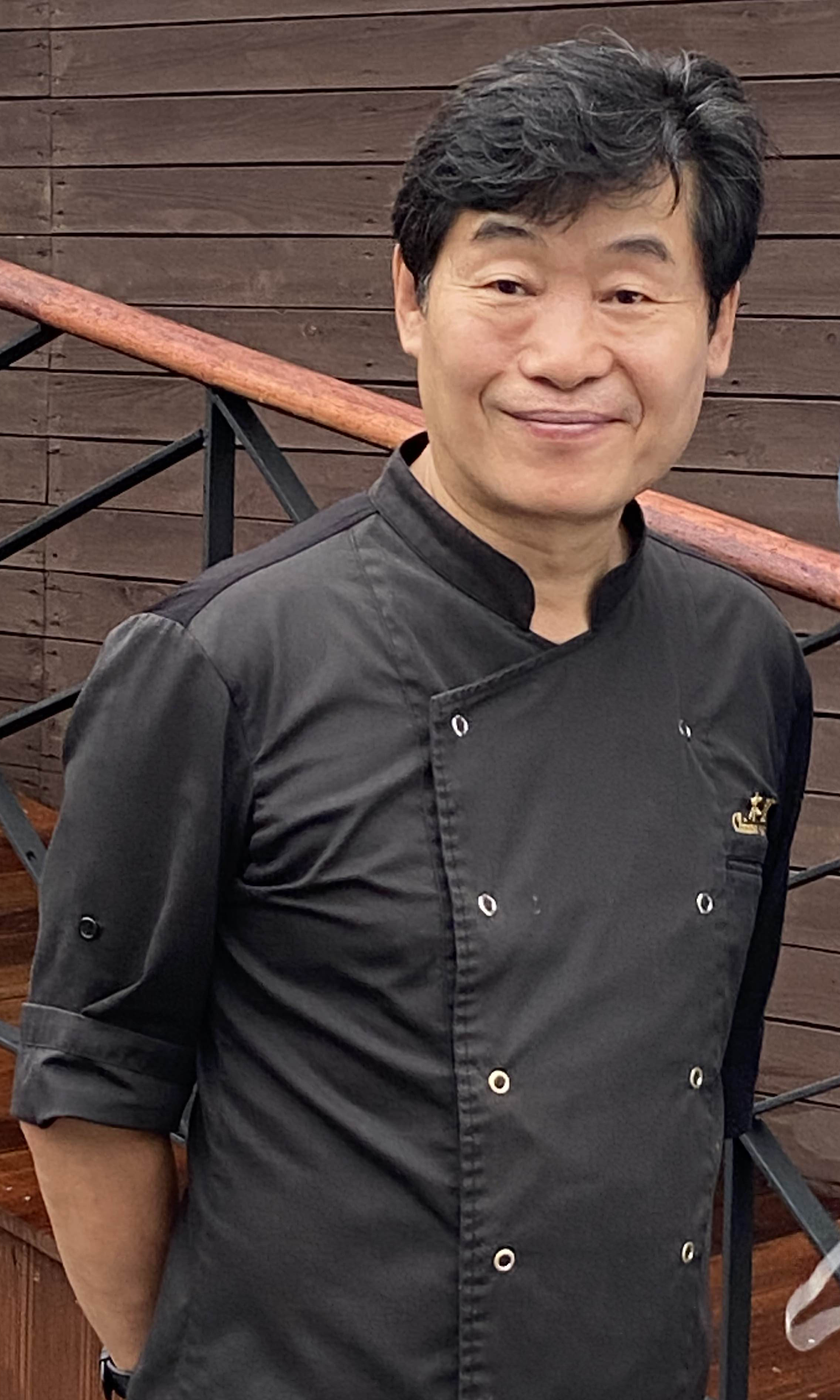 요리사 이연복.